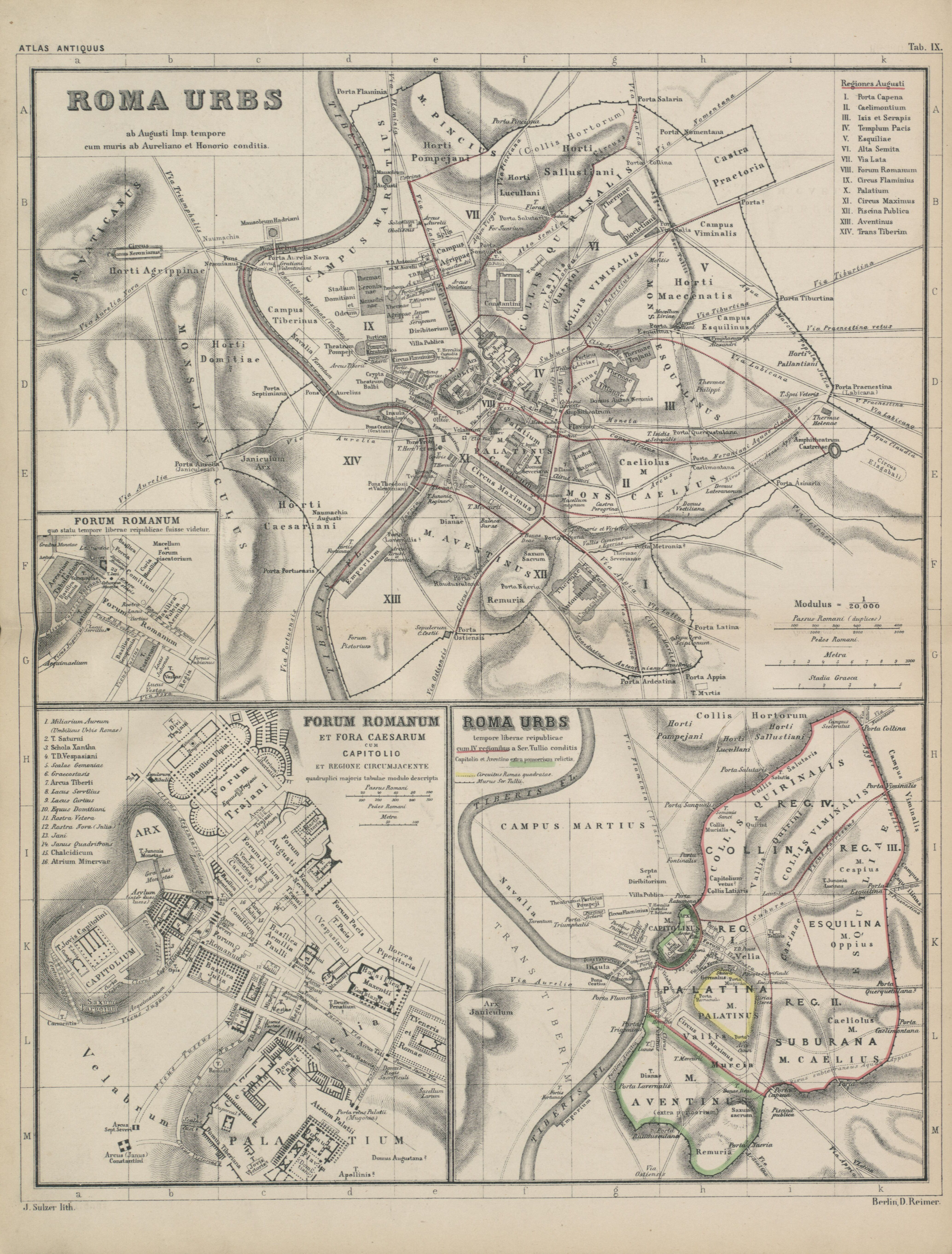 z atlasu "Atlas antiquus. Zwölf Karten zur Alten Geschichte"